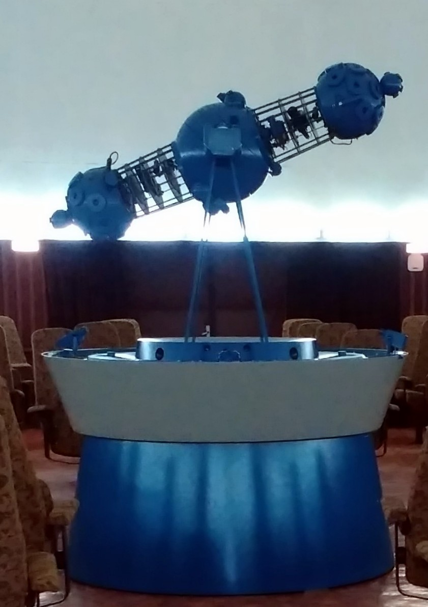 Планетариум ВВМУ проекционен проектор RFP-DP